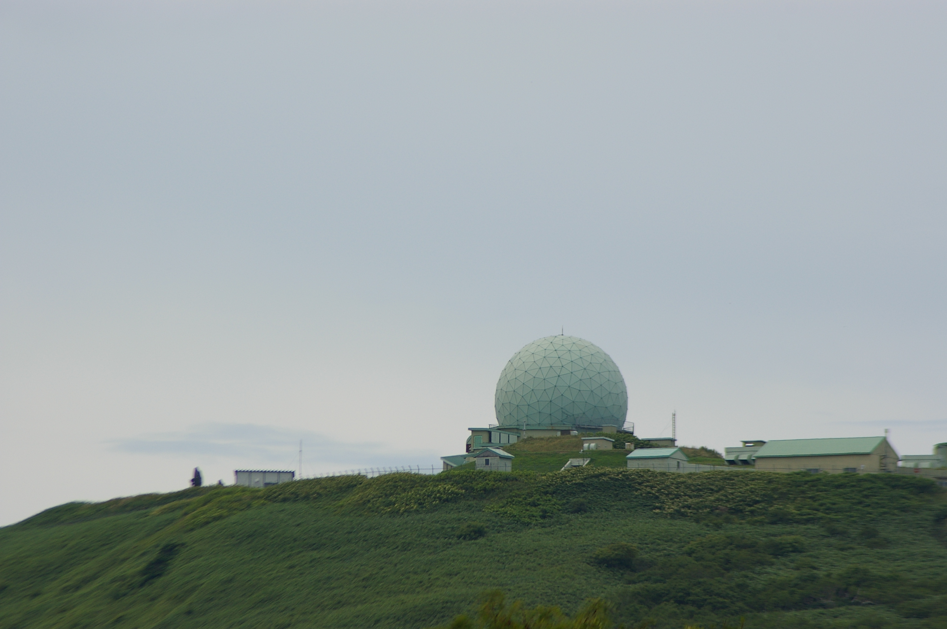 Radar site, JASDF 18th watch unit (Wakkanai city, Hokkaido).